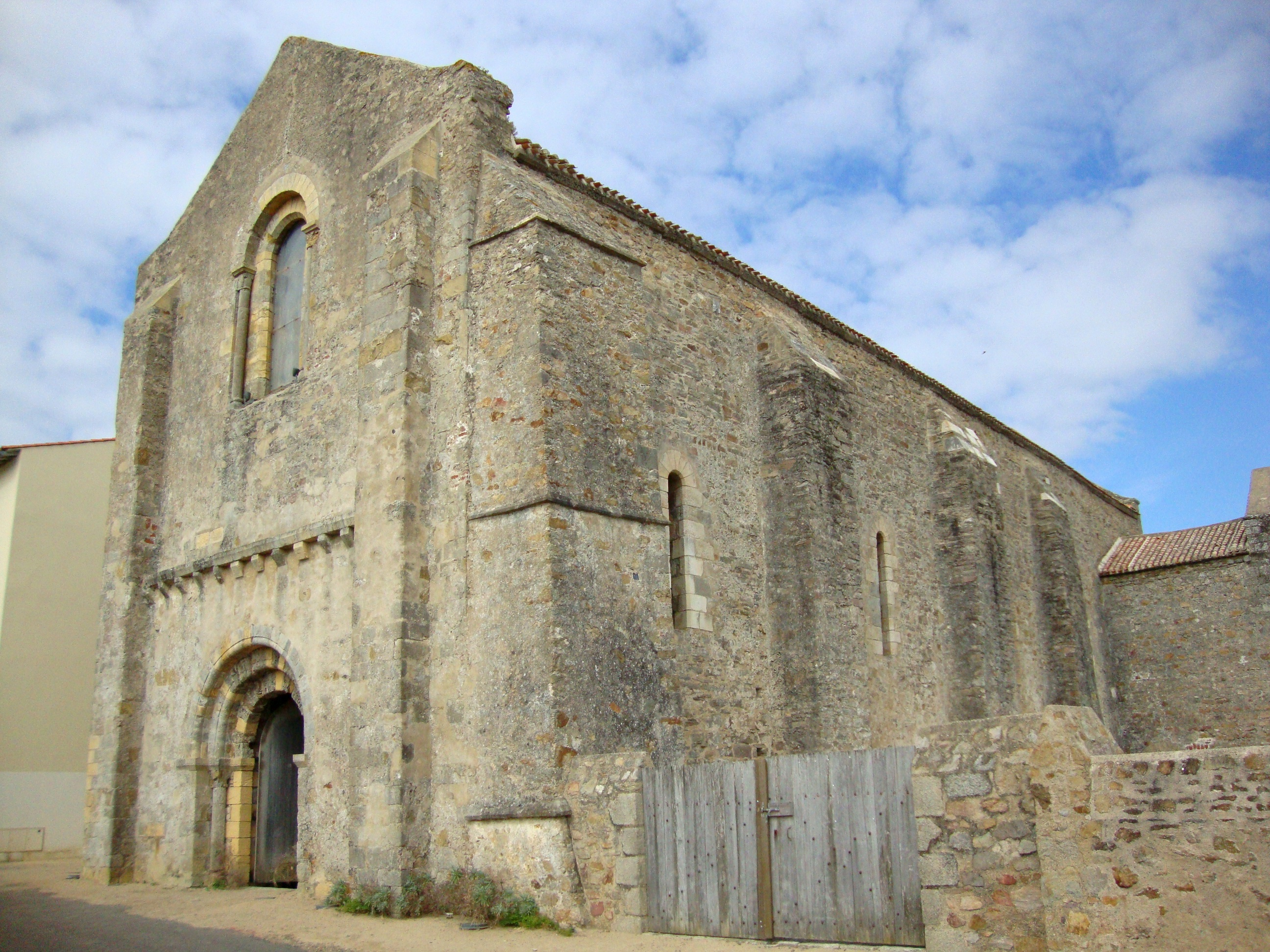 Abbaye de Saint-Jean d'Orbestier, (Inscrit, 1935)